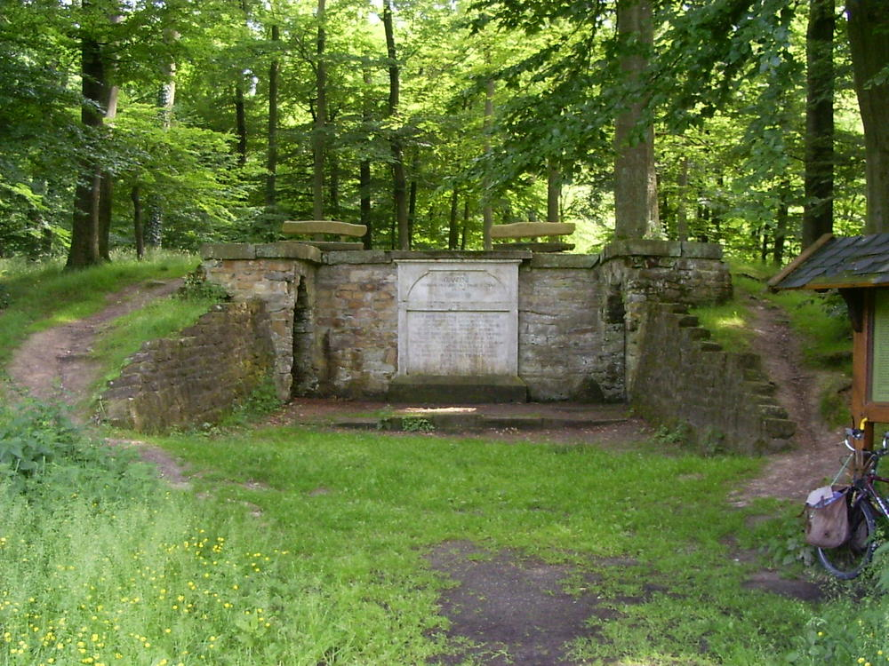 Die Luccaburg beim Kloster Loccum